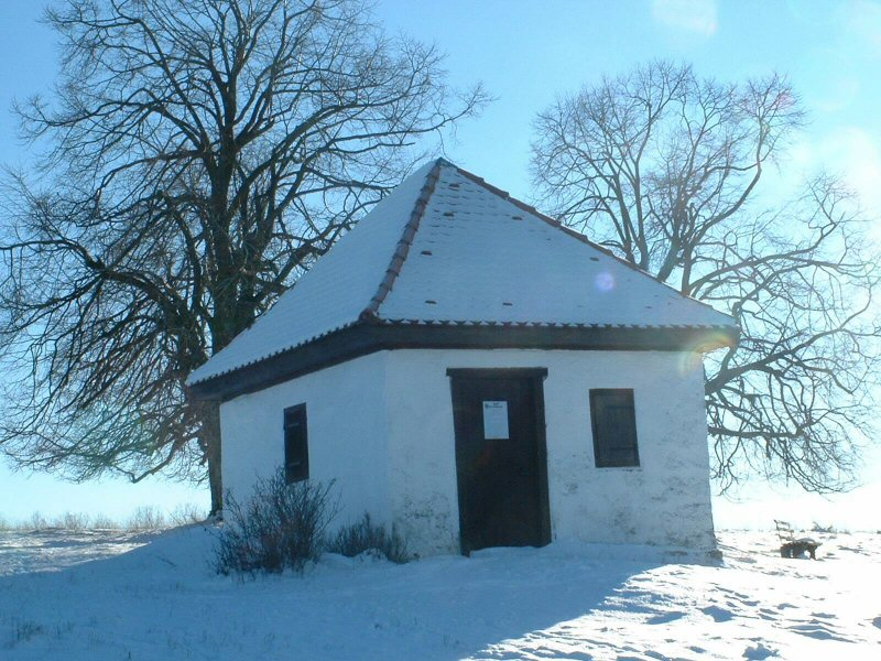 GNU FDL - Mit Genehmigung der Gemeindeverwaltung